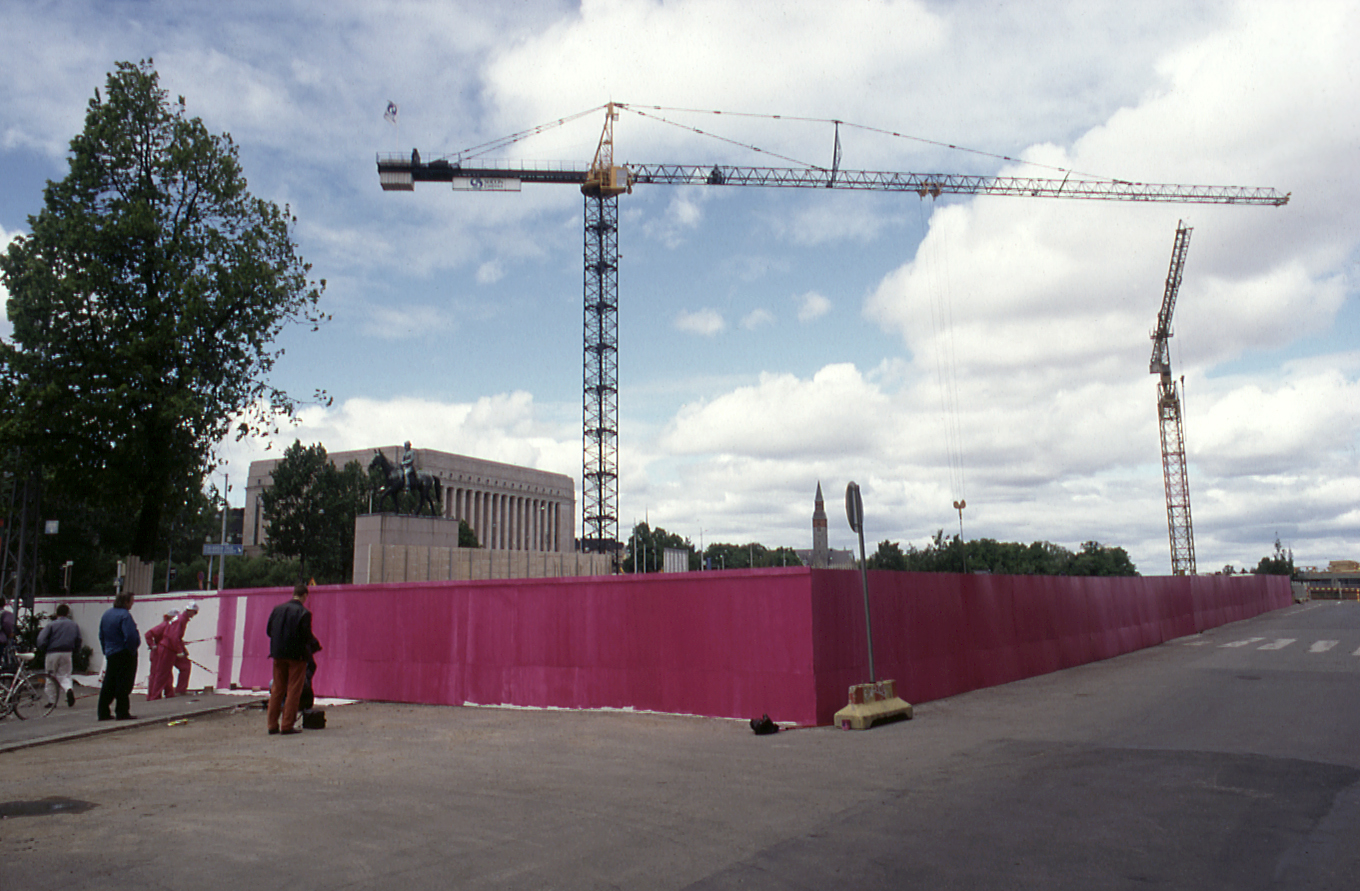 The construction of Kiasma began in 1996. A competition was held to decorate the site hoarding. Art student Nanne Prauda’s winning entry involved painting the hoarding aniline pink. Later on, pink was adopted as the emblematic colour of Kiasma. Kiasman rakentaminen alkoi vuonna 1996. Työmaa-aidan komistamiseksi järjestettiin kilpailu, jonka voitti taideopiskelija Nanne Praudan ehdotus. Aita maalattiin aniliininpunaiseksi. Pinkistä tuli Kiasman tunnusväri. Photo: Finnish National Gallery / Petri Virtanen